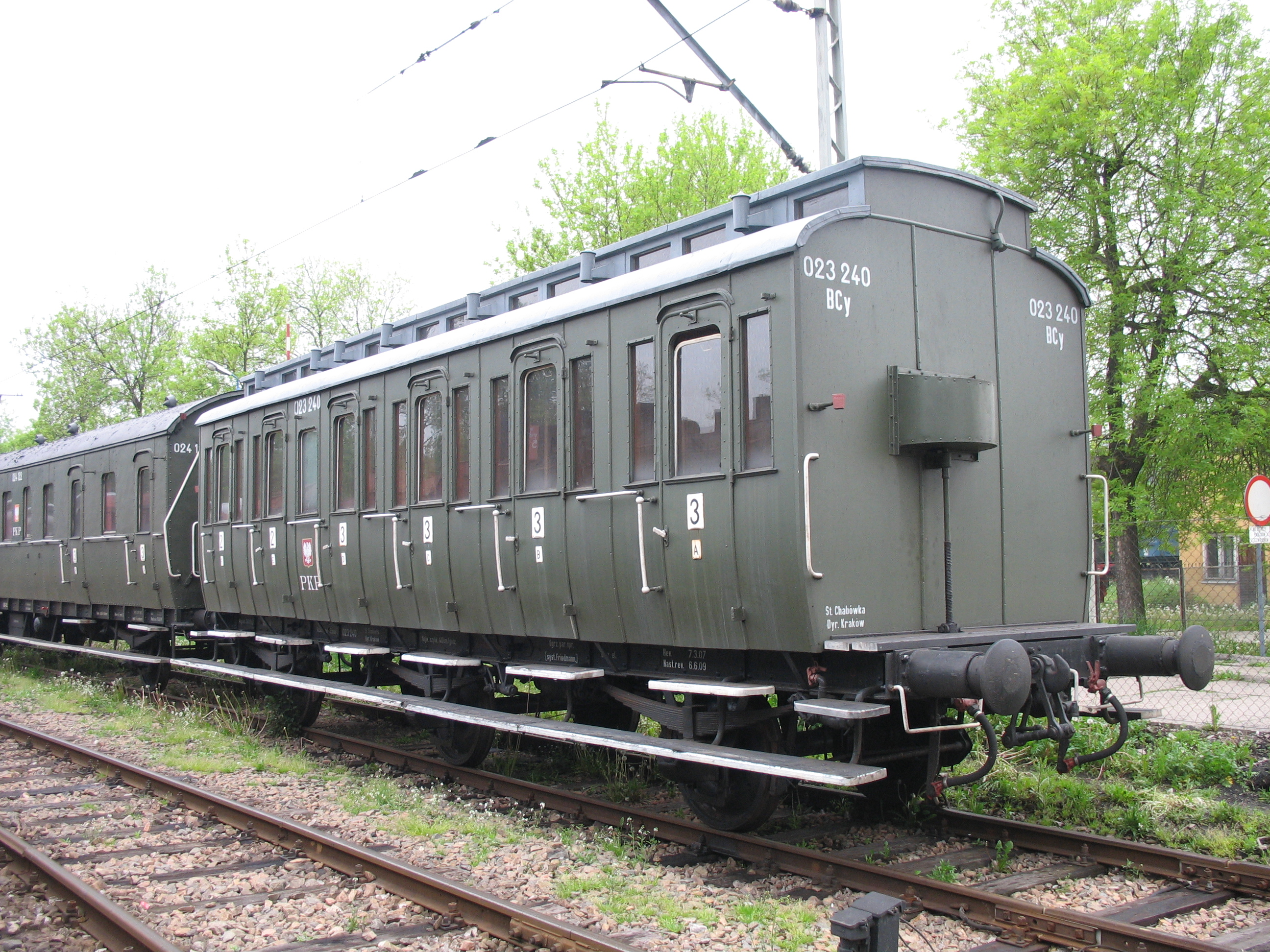 Wagon osobowy BCy numer 023 240. Zbudowany w 1906 roku. Eksponat skansenu taboru kolejowego w Chabówce